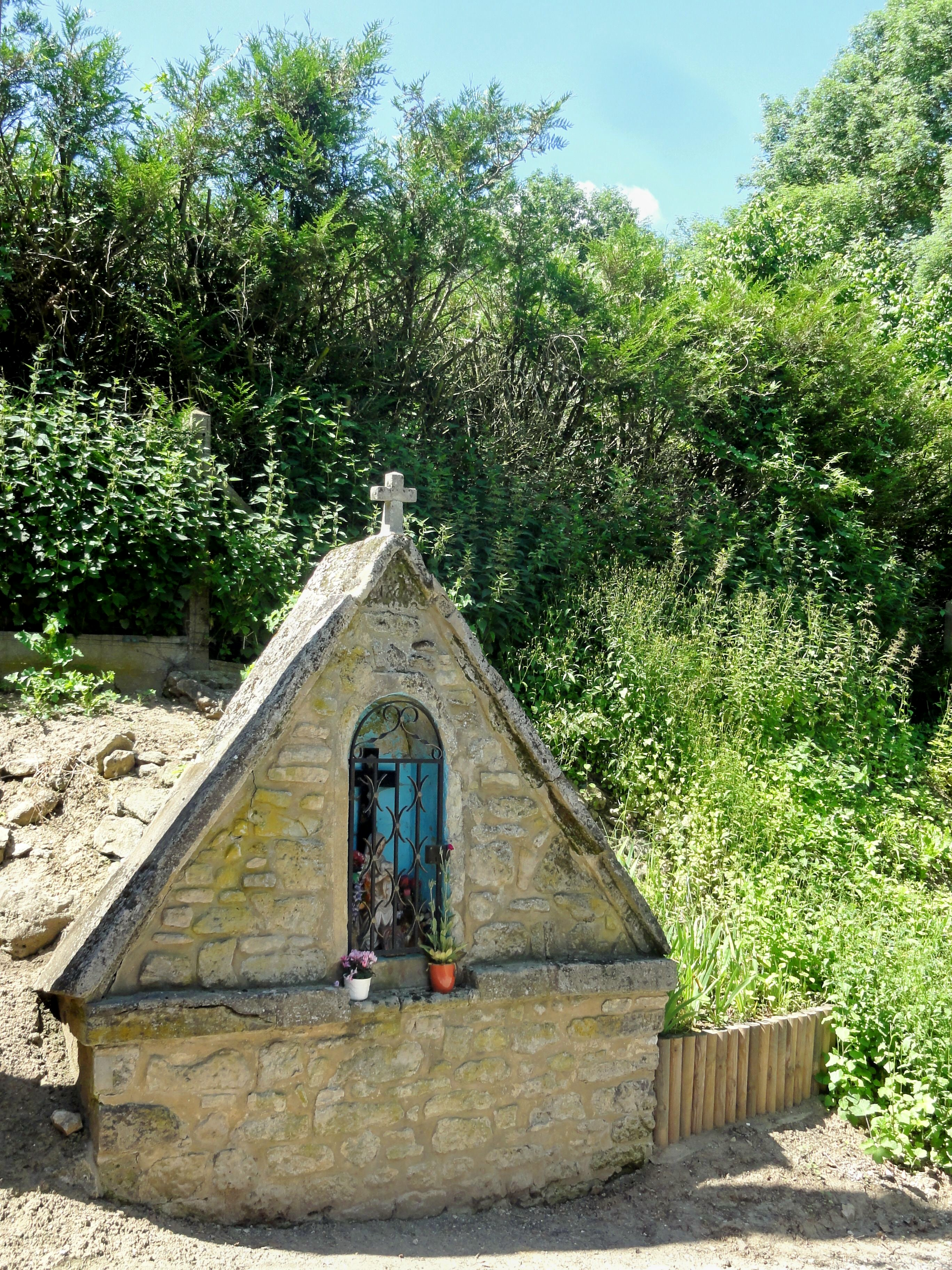 Vierge, rue de la Vierge au hameau de Coupin.